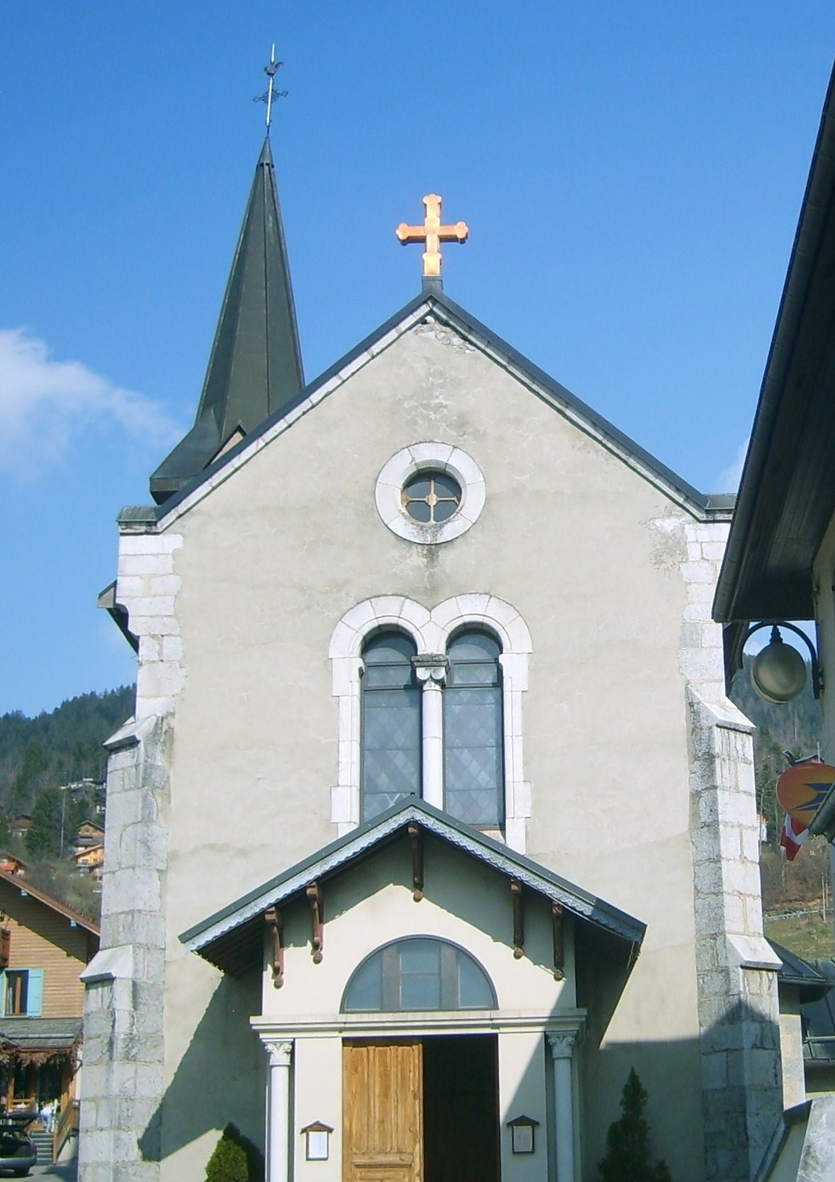 Eglise de Saint-Jean-de-Sixt : commune française, située dans le département de la Haute-Savoie et la région Rhône-Alpes, proche de la ville La Clusaz.